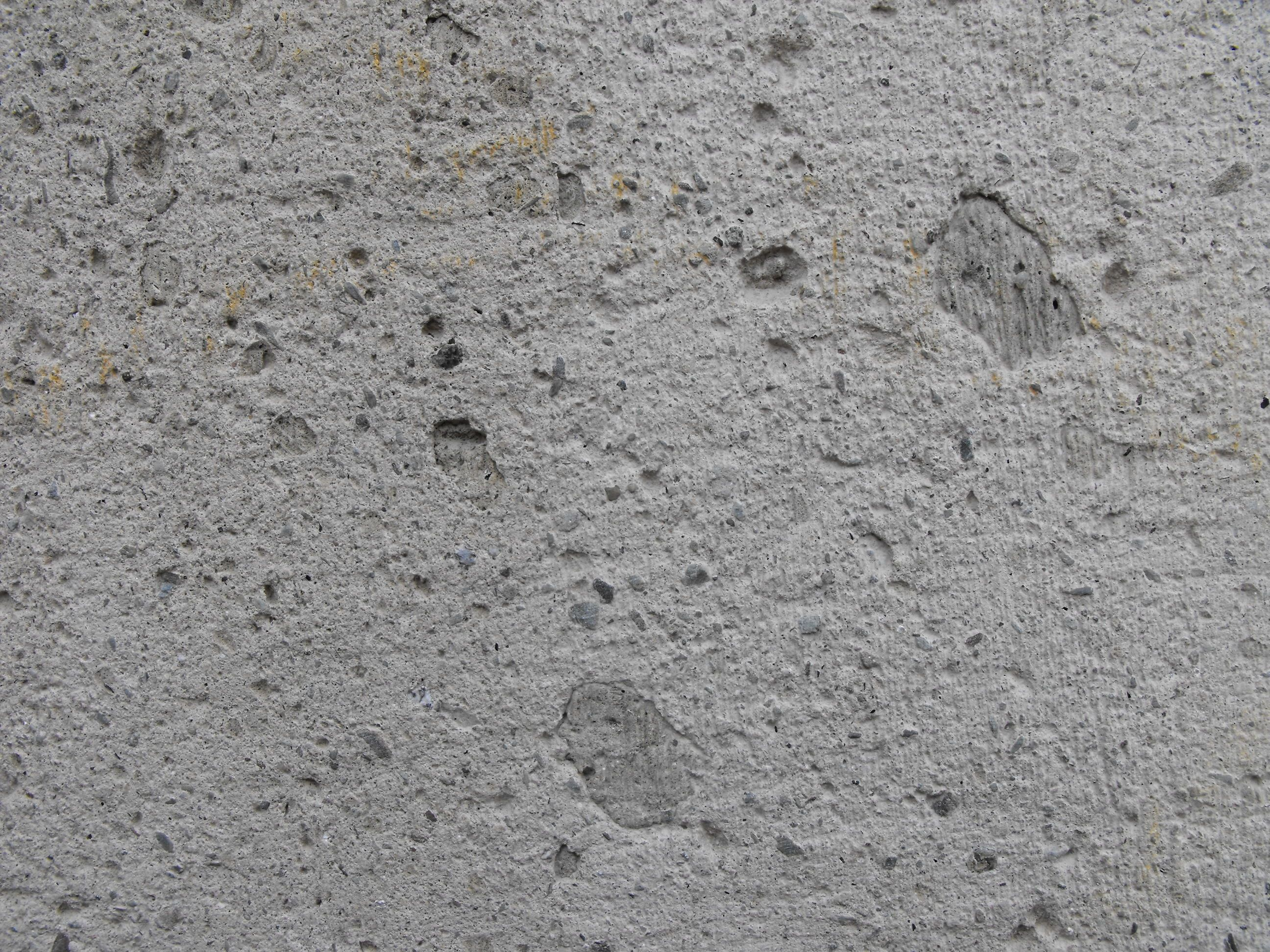 Trachyt mit Sanidin-Einsprenglingen als Werkstein an der Südfassade der Herz-Jesu-Kirche in Aachen - Burtscheid